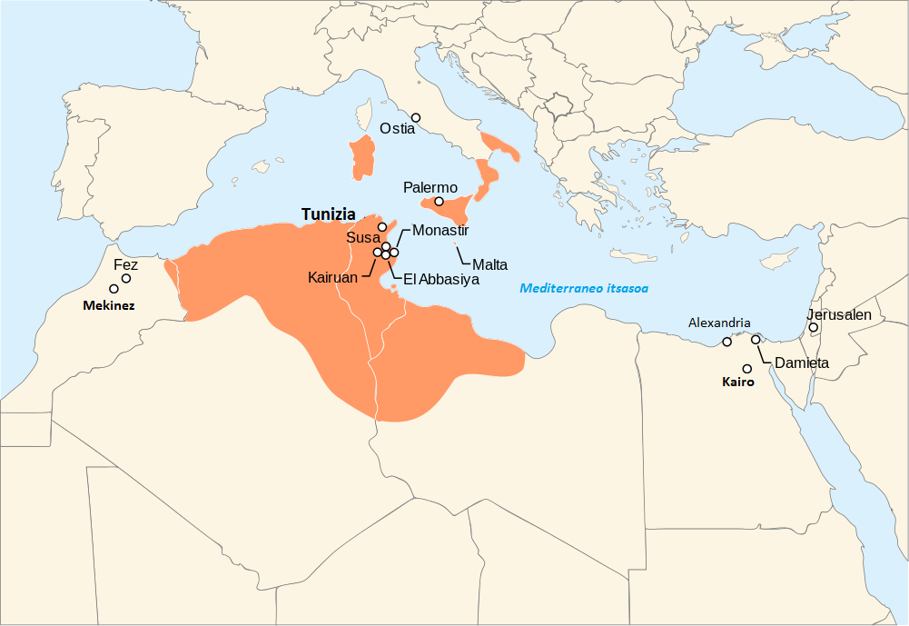 Aglabtar leinua K. a. 800-909